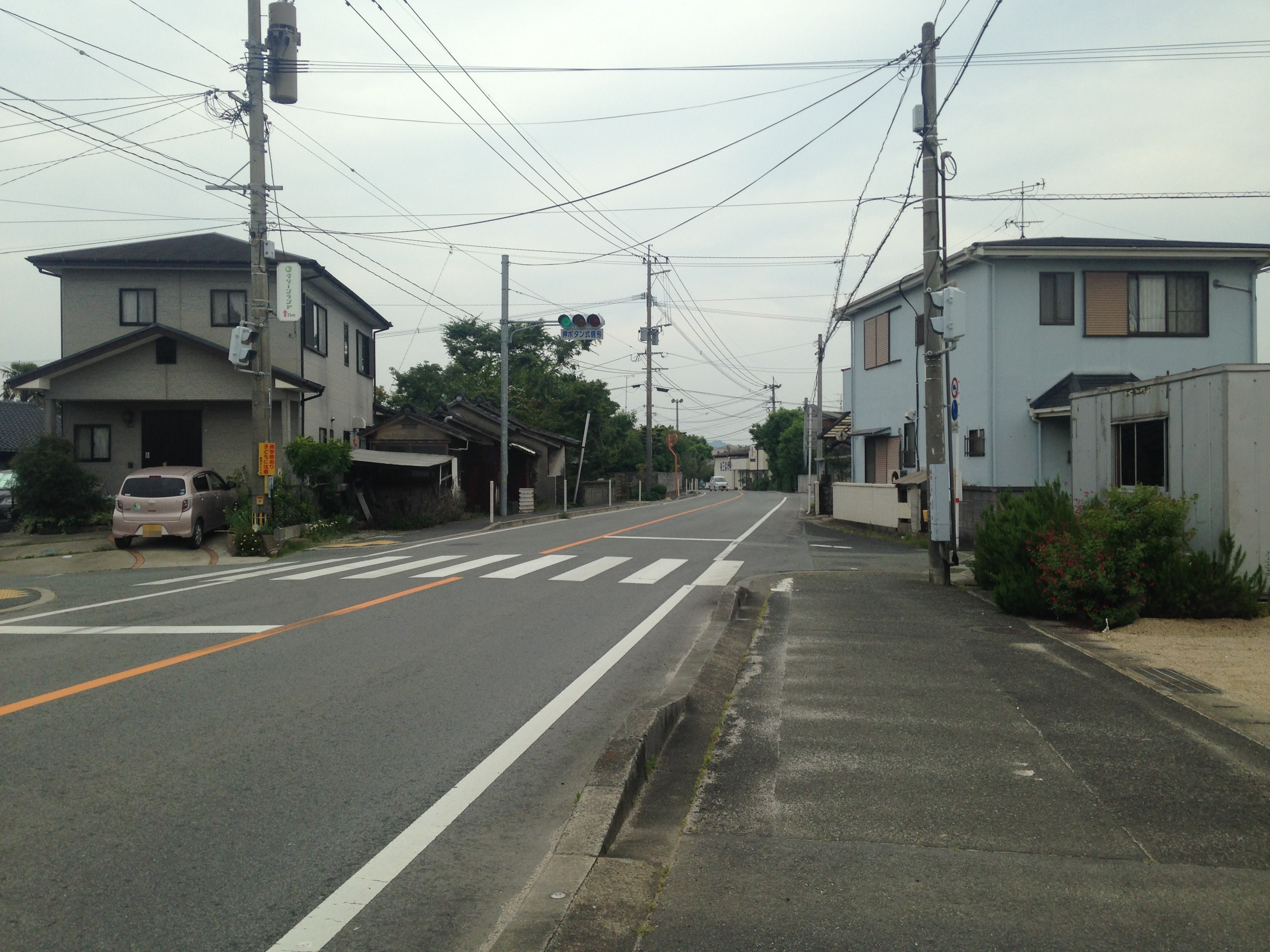 長洲町内の熊本県道46号